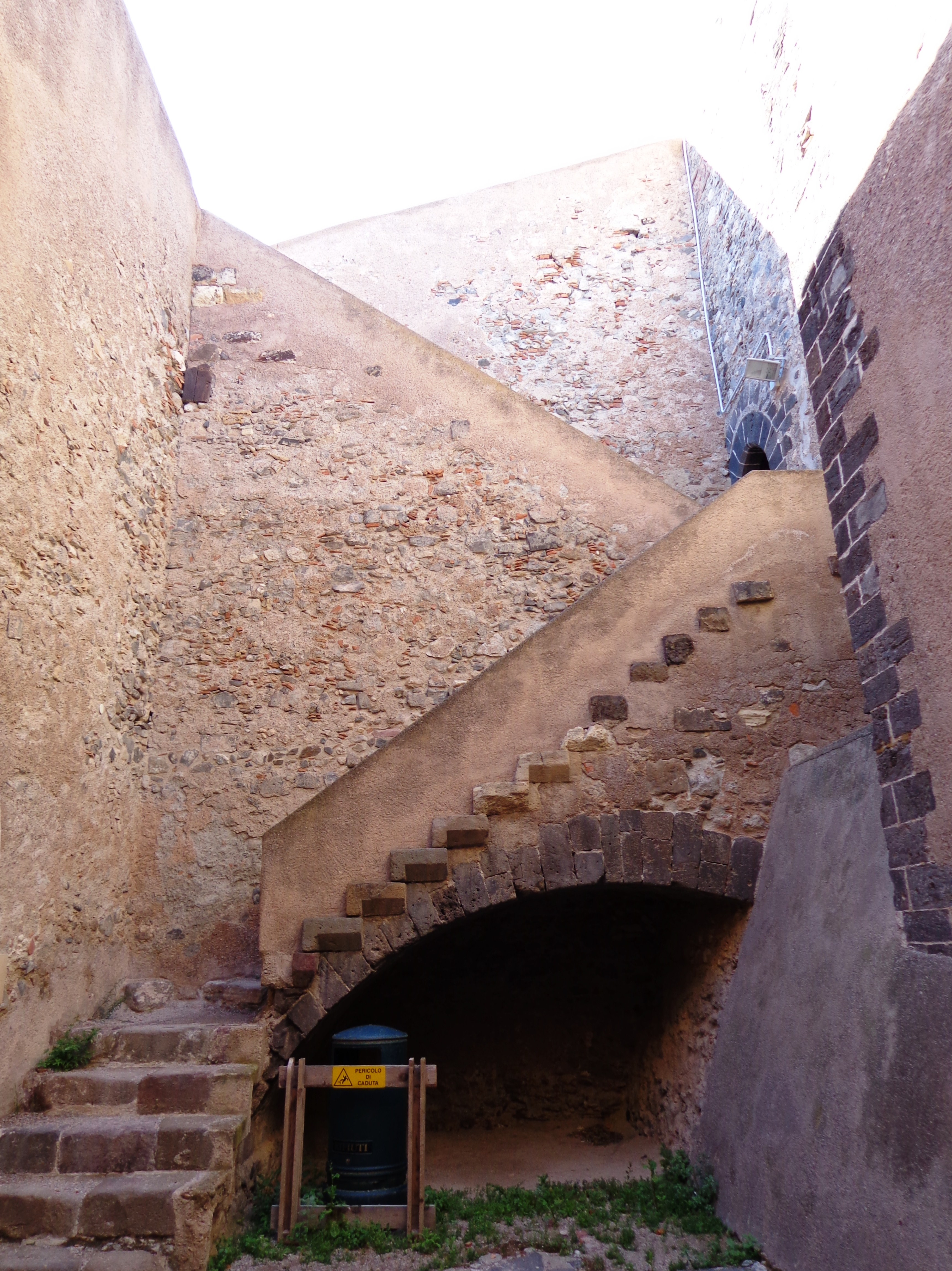 Salita al Torrione